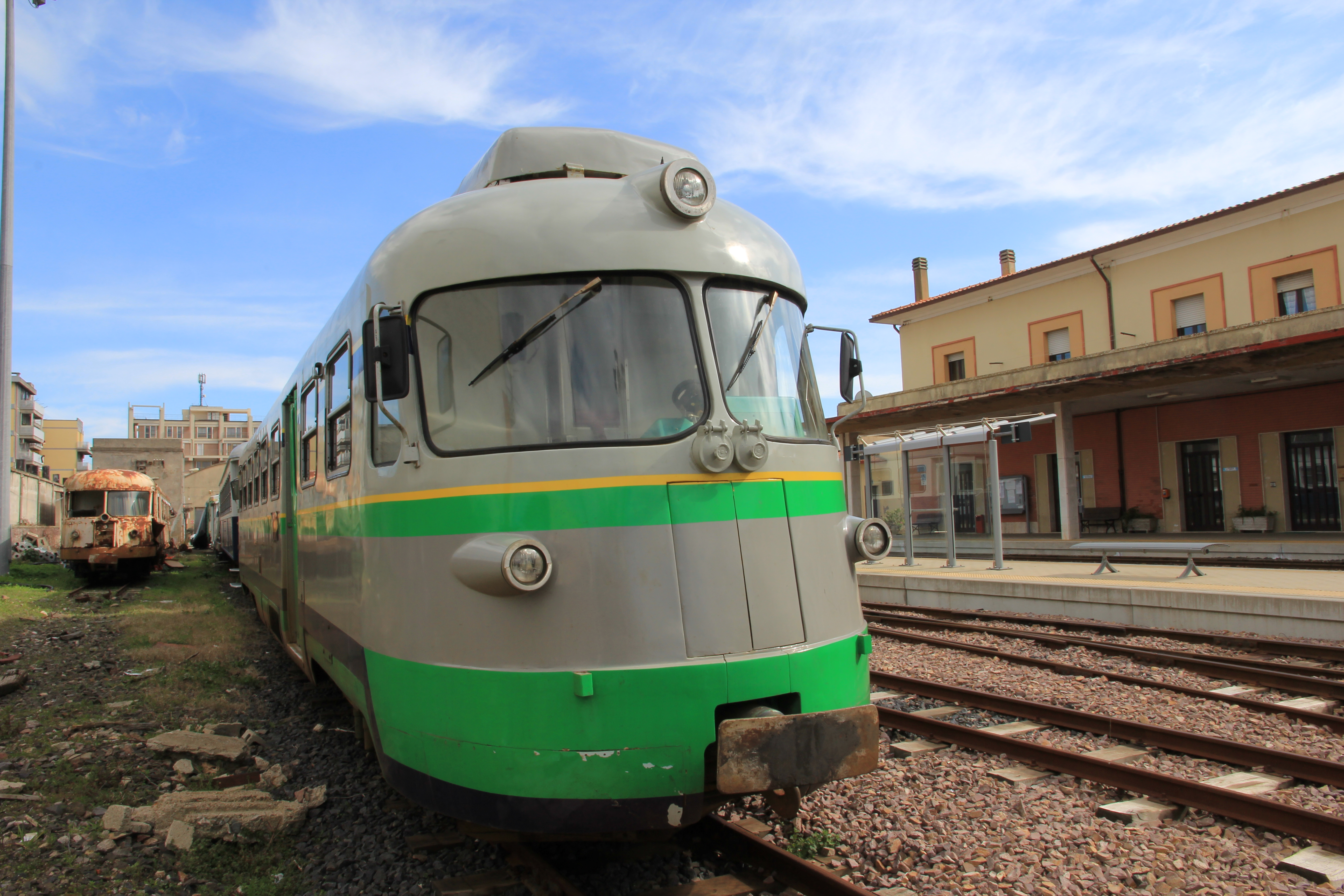 Macomer - Stazione ferroviaria ARST